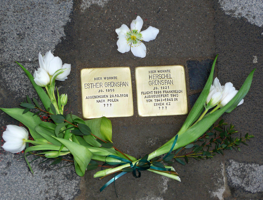 Stolpersteinverlegung für Herschel Grünspan in Hannover